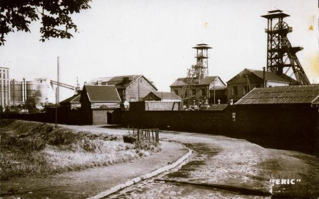 La fosse Thiers de la Compagnie des mines d'Anzin était un charbonnage constitué de deux puits situé à Saint-Saulve, Nord, Nord-Pas-de-Calais, France.